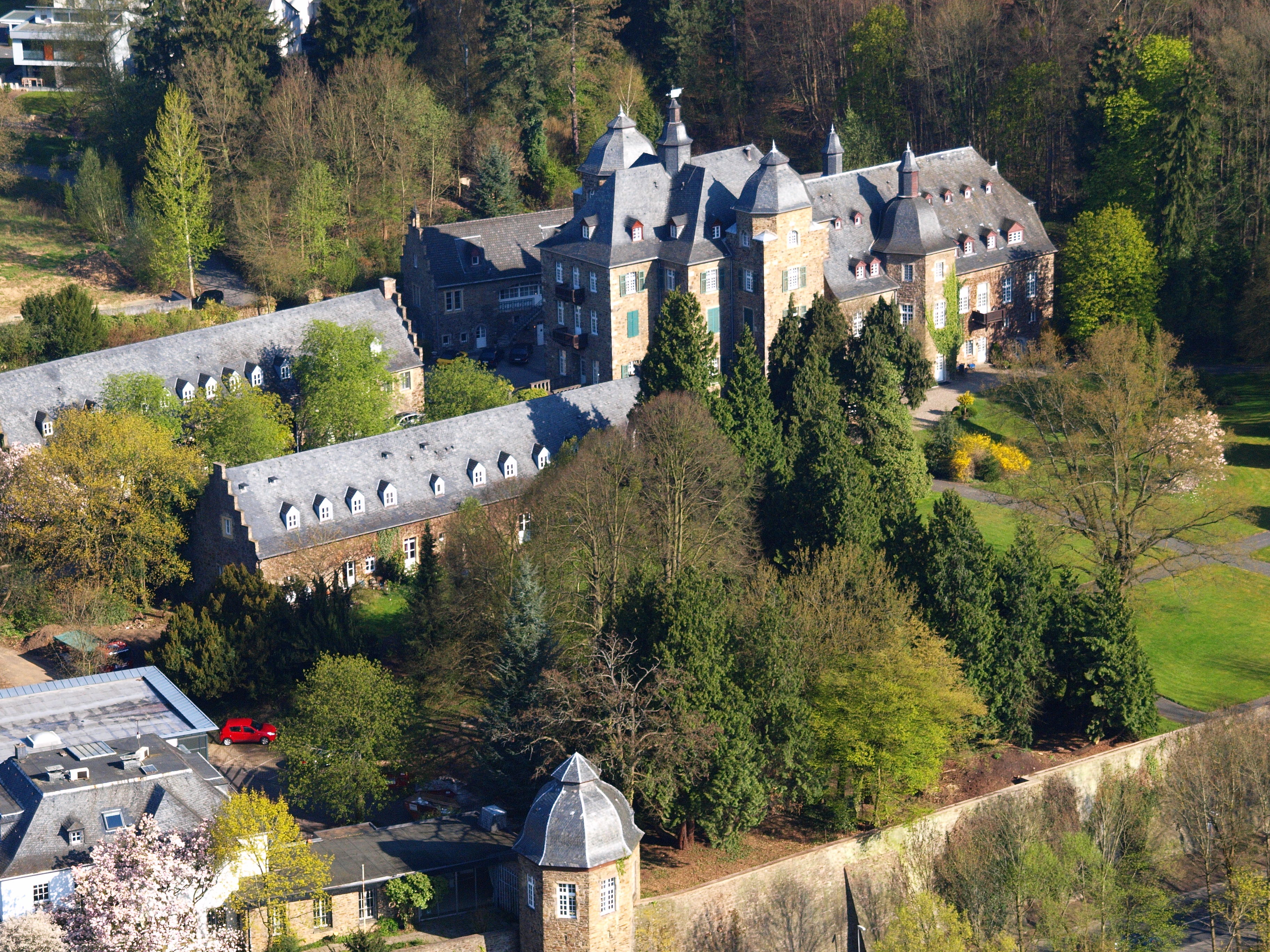 Schloss Allner: Luftaufnahme